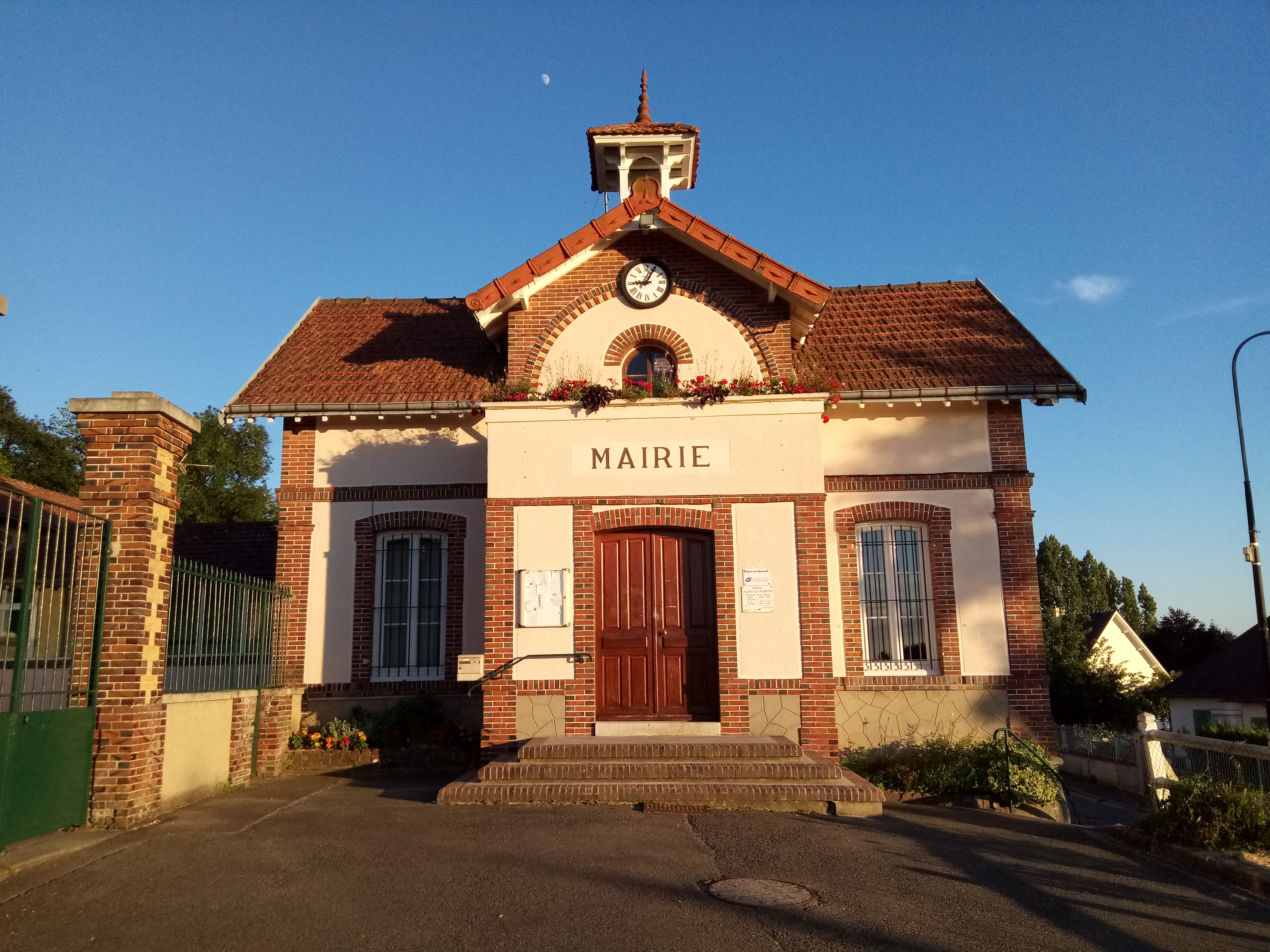 Mairie de Villiers-le-Morhier